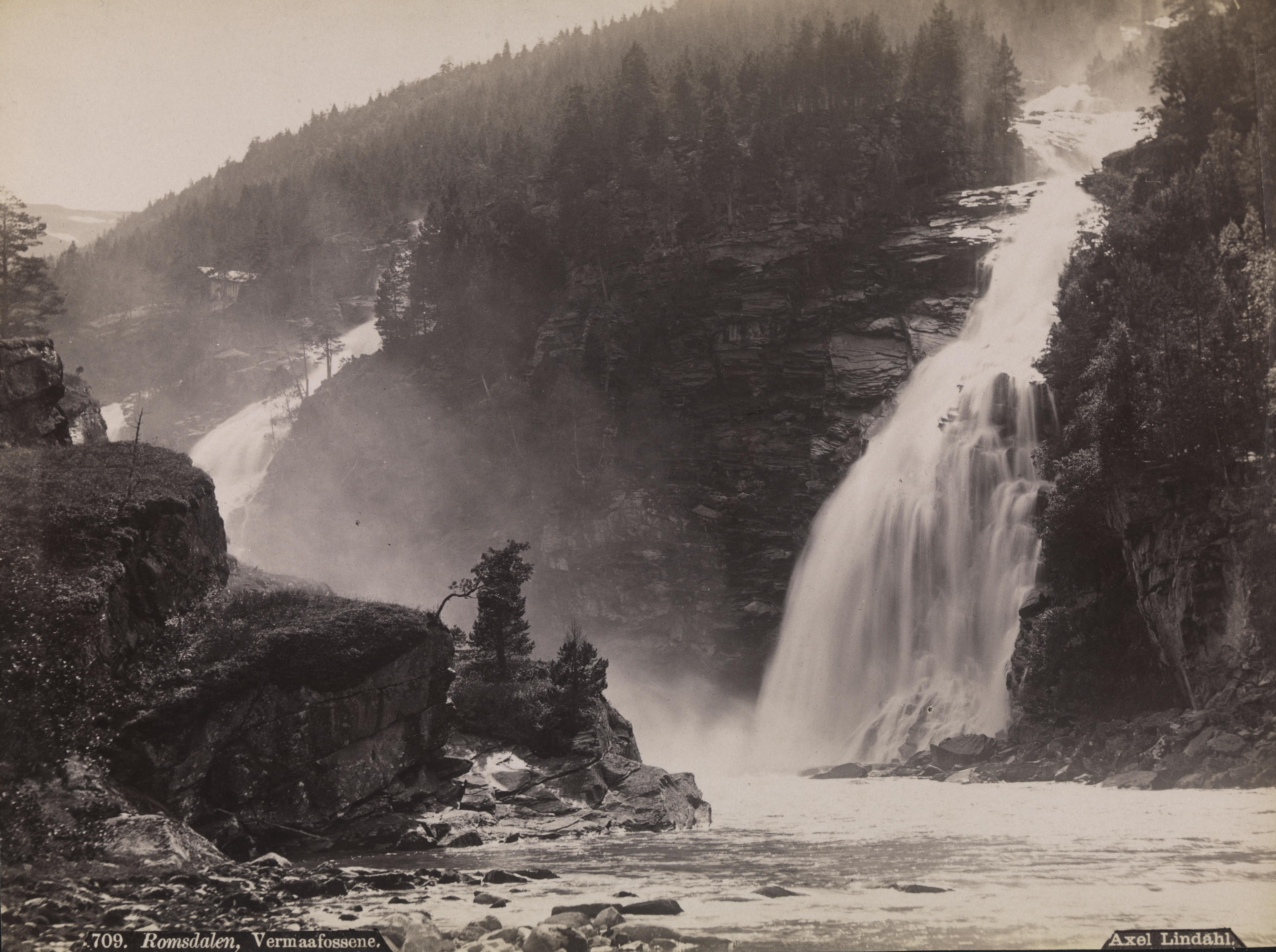 Bildet er hentet fra Nasjonalbibliotekets bildesamling Vermafossen, Rauma, Møre og Romsdal